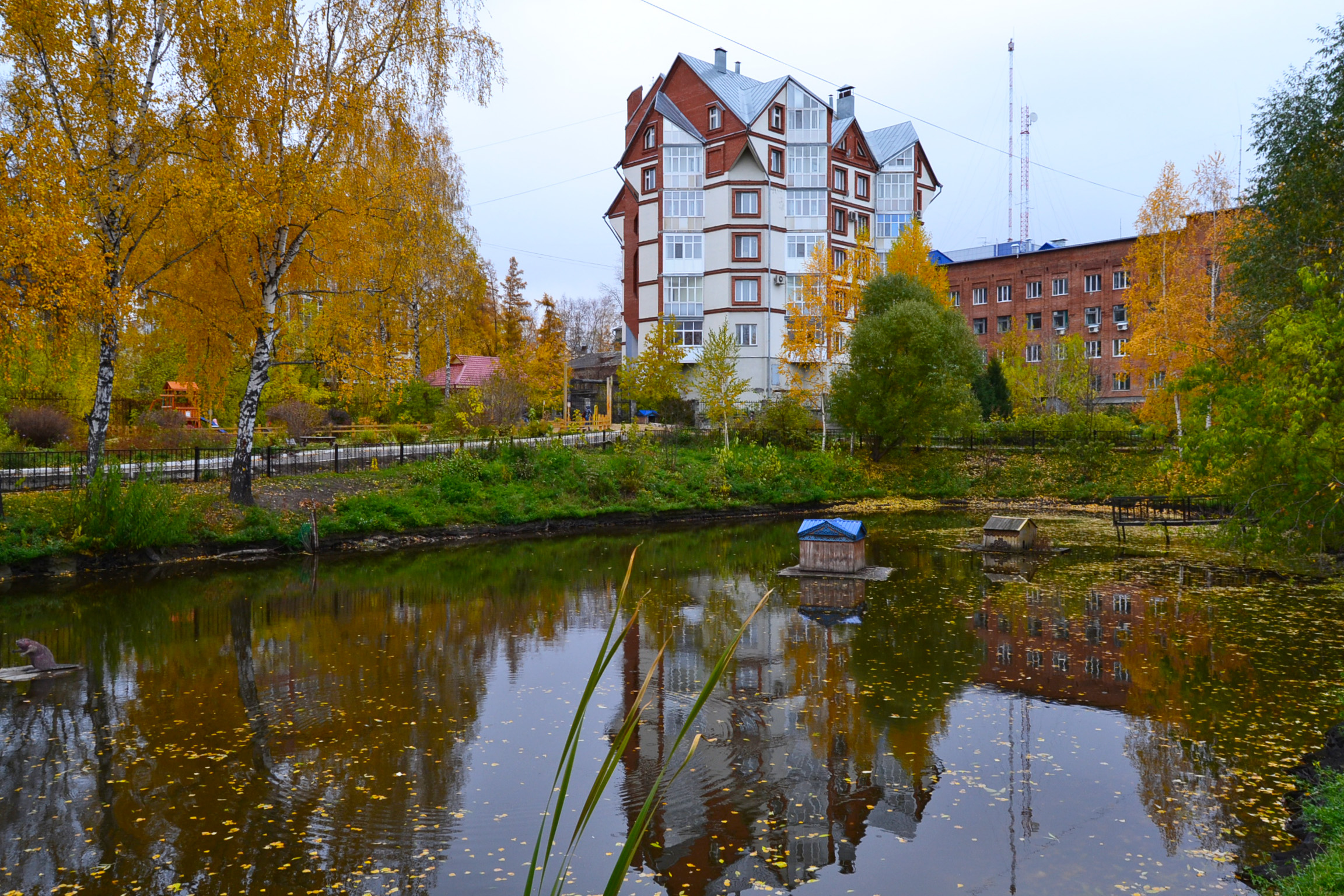 Пруд в городском парке Томска